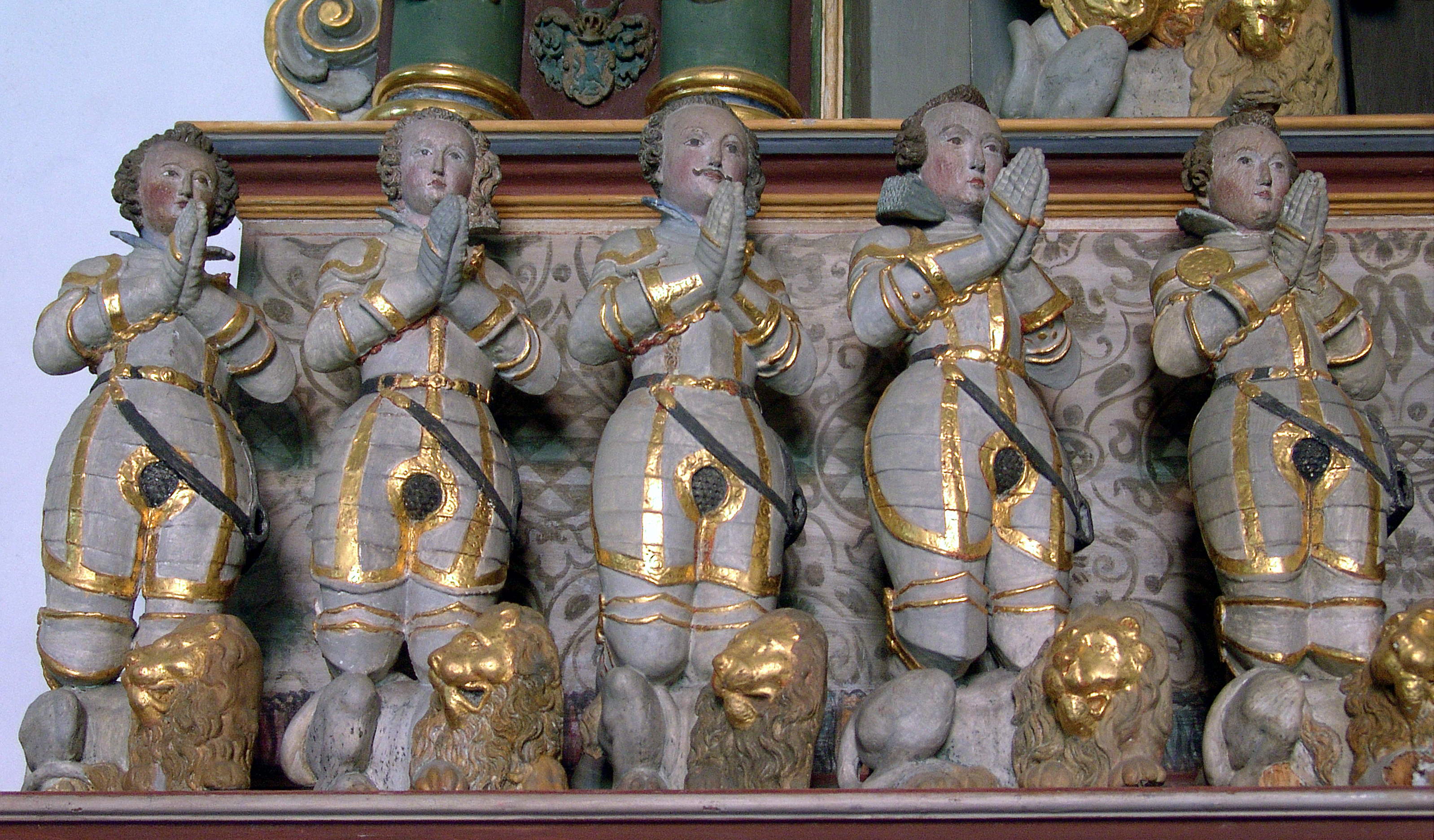 Epitaph in der evang.-luth. Kirche St. Jakobus in Irmelshausen